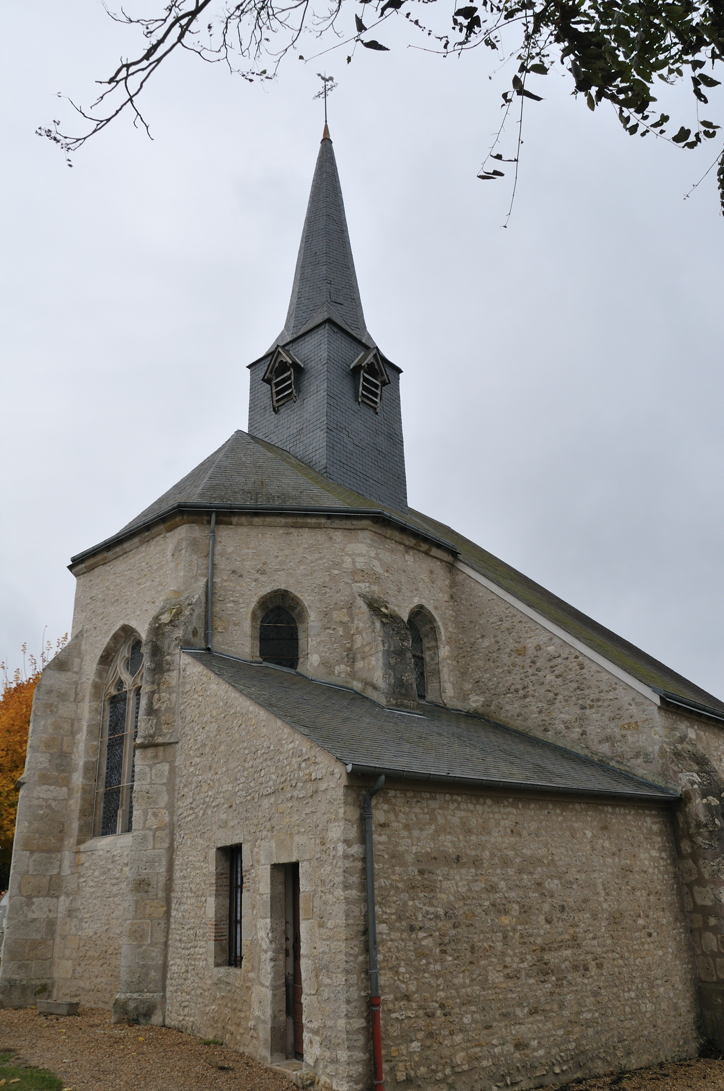 Église Saint-Martin de Bouilly-en-Gâtinais, Loiret, France